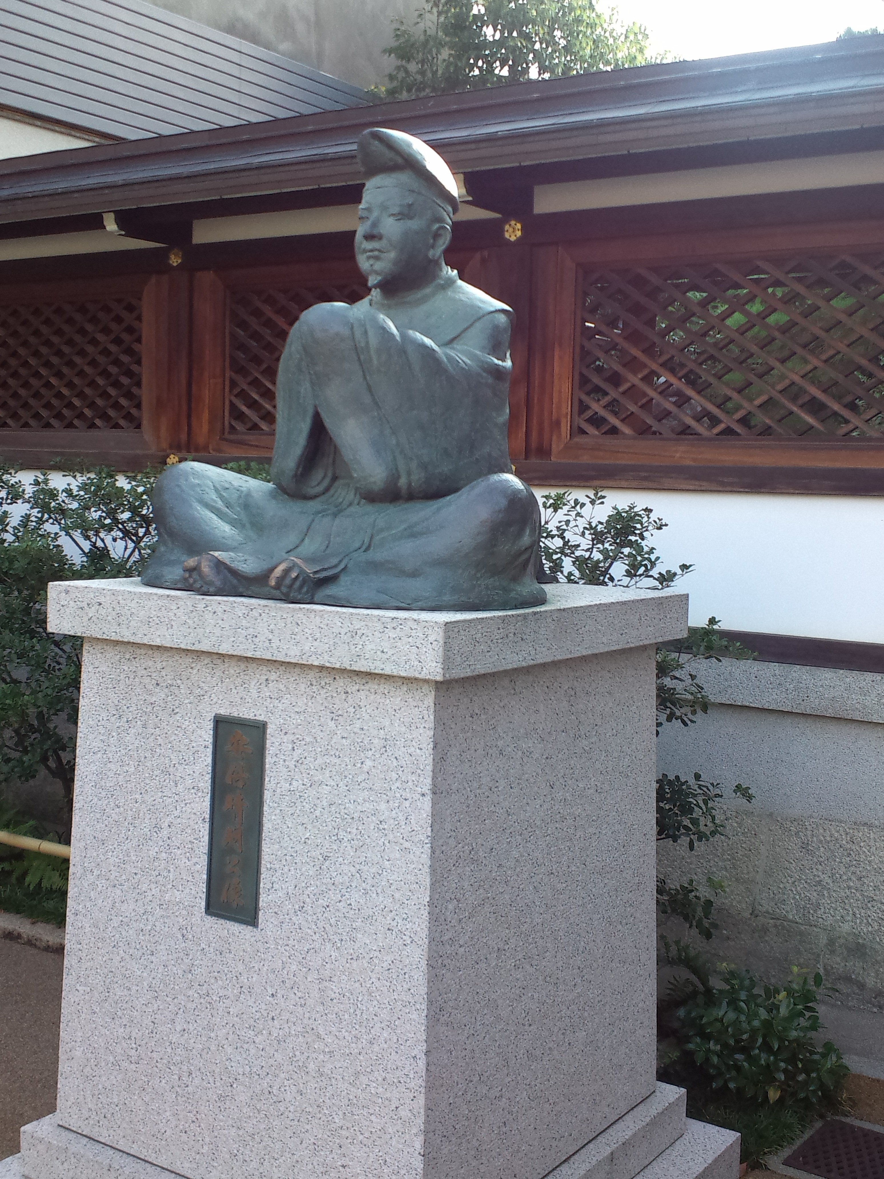 晴明神社 晴明の像